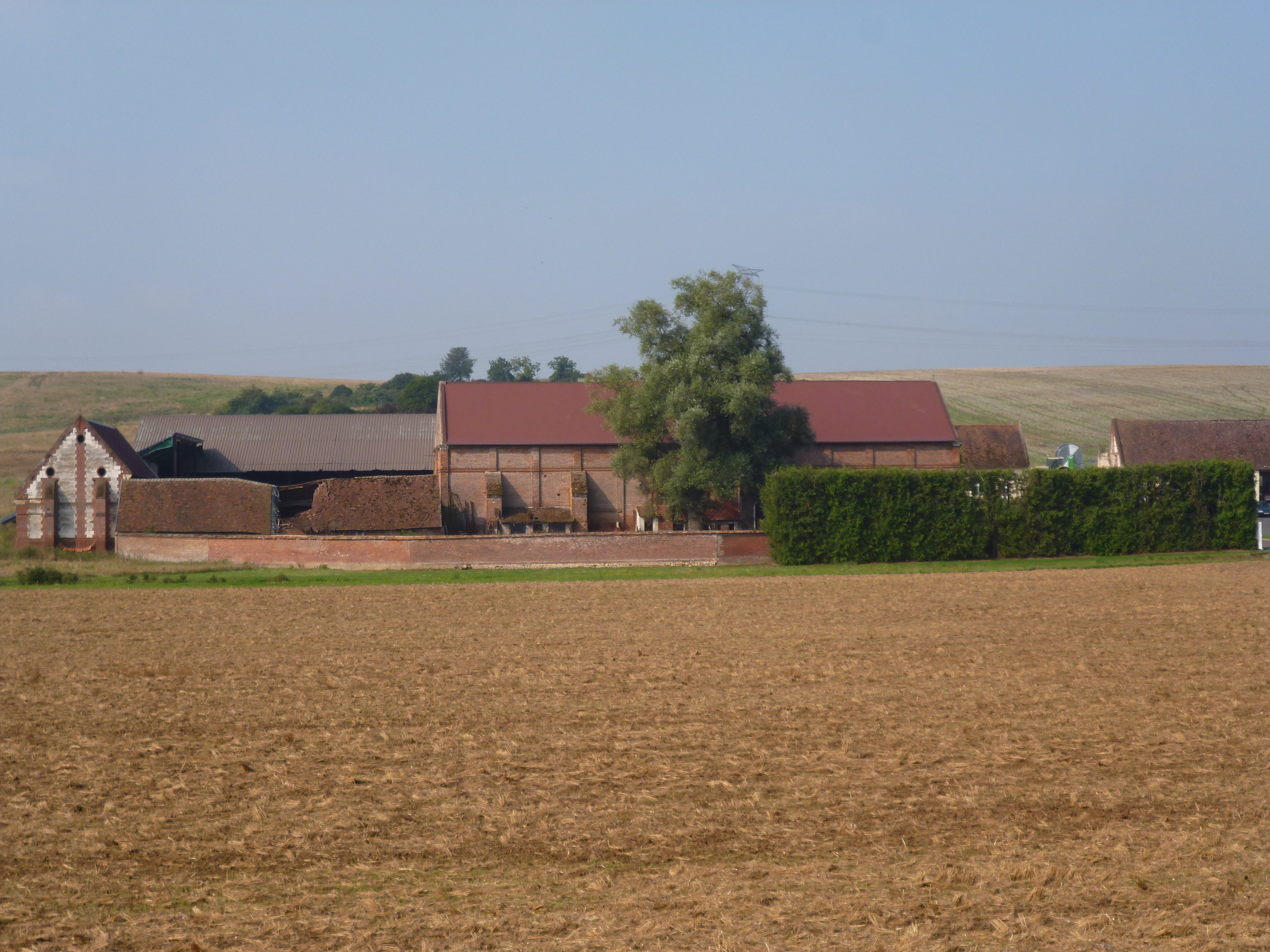 Grange de Mauregard, située sur la commune de Reuil-sur-Brêche (Oise, Picardie). Inscrite MH 1988.